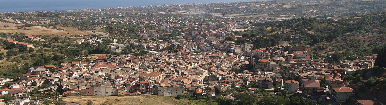 Gioiosa Jonica Panorama da Contrada Maria Vergine